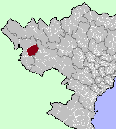 Tuan Giao District, Dien Bien Province, Vietnam.